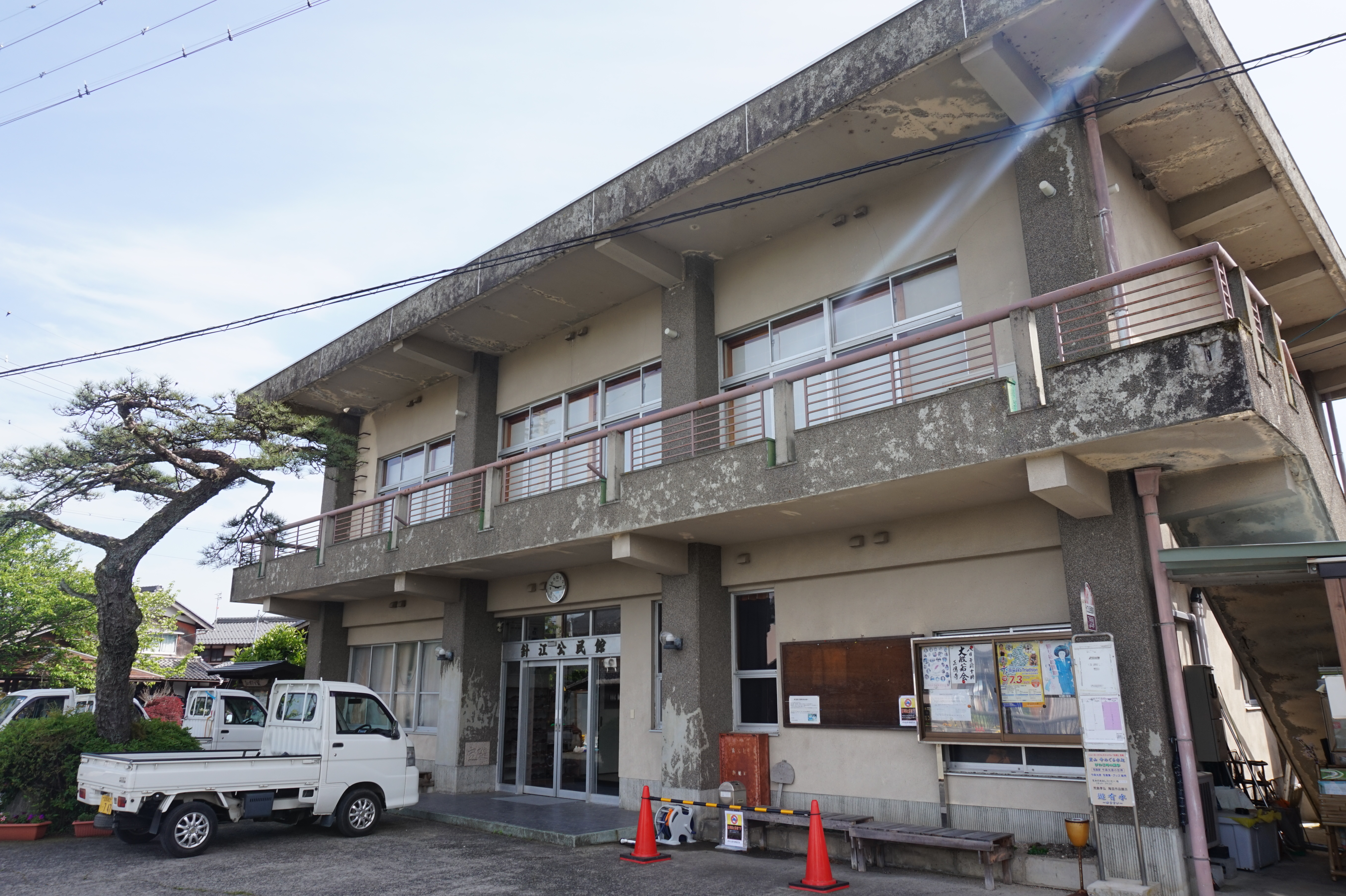 滋賀県高島市新旭町針江の針江公民館。